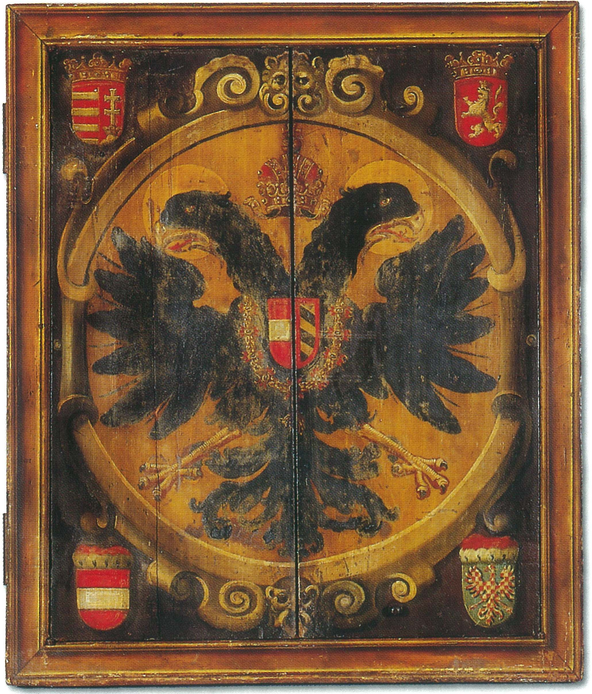 Tabernakel1